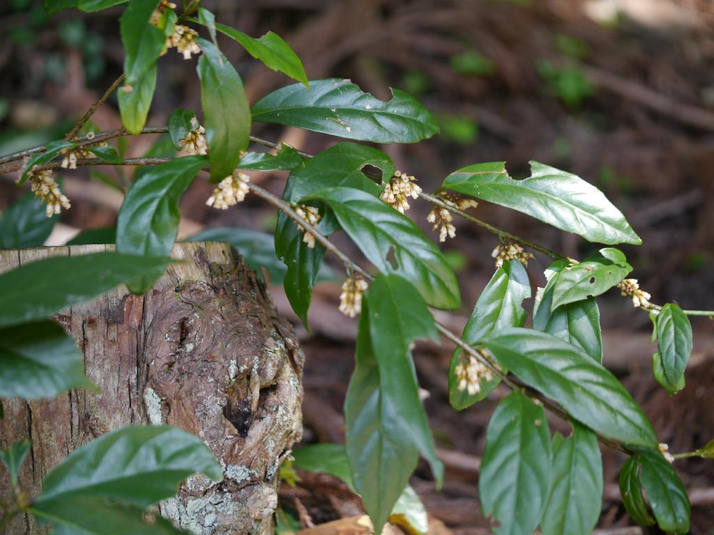 Maesa japonica：イズセンリョウ 2017/04/30 和歌山県田辺市：Tanabe City. Wakayama Pref. Japan